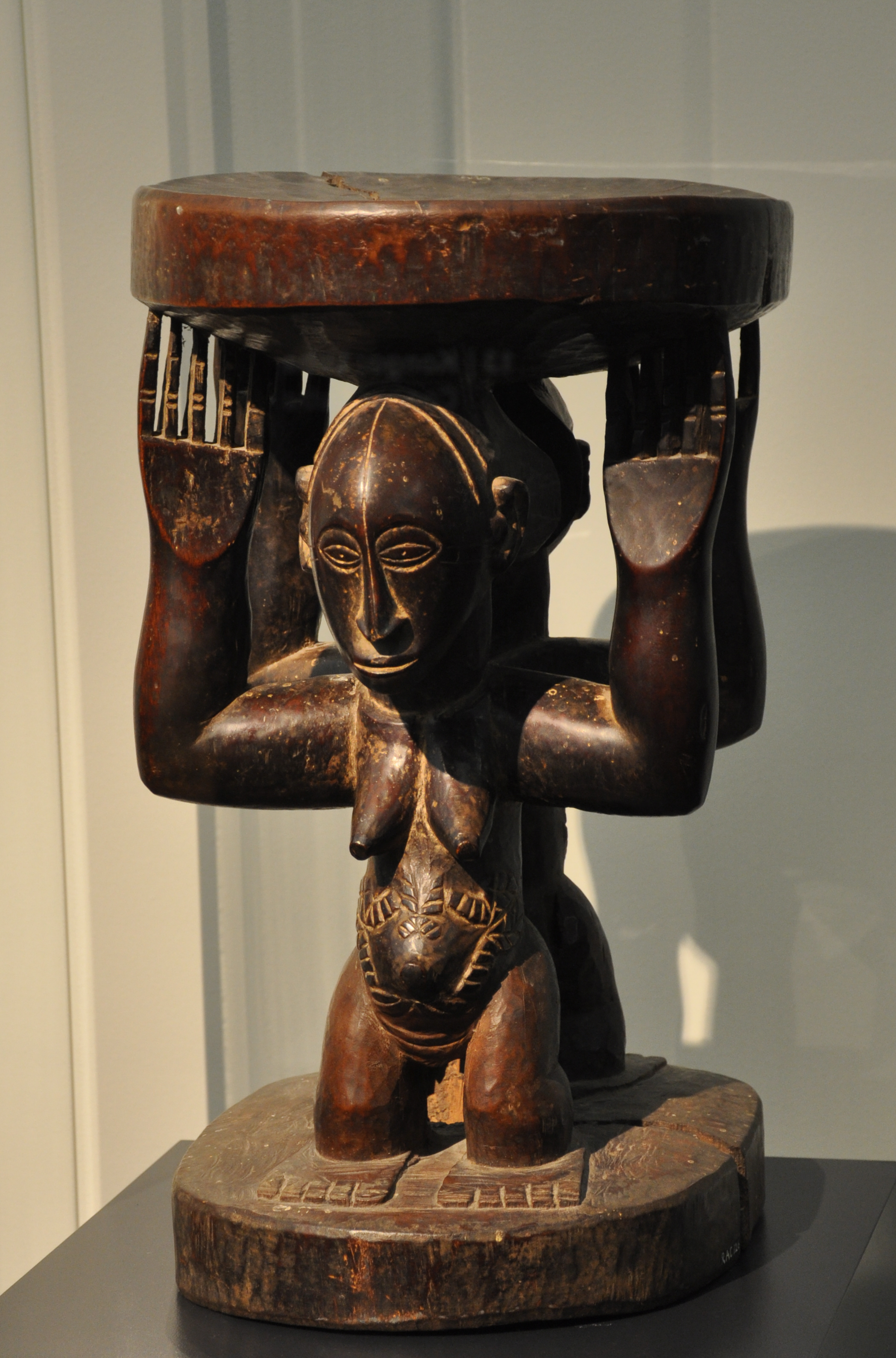 Stuhl (Thron) eines Oberhaupts, Hemba-Werkstatt der Kasai-Region, Dem. Rep. Kongo; 19./frühes 20. Jh.; Holz Museum Rietberg, Zürich; Geschenk Rietberg-Gesellschaft; Inv. Nr. RAC 126